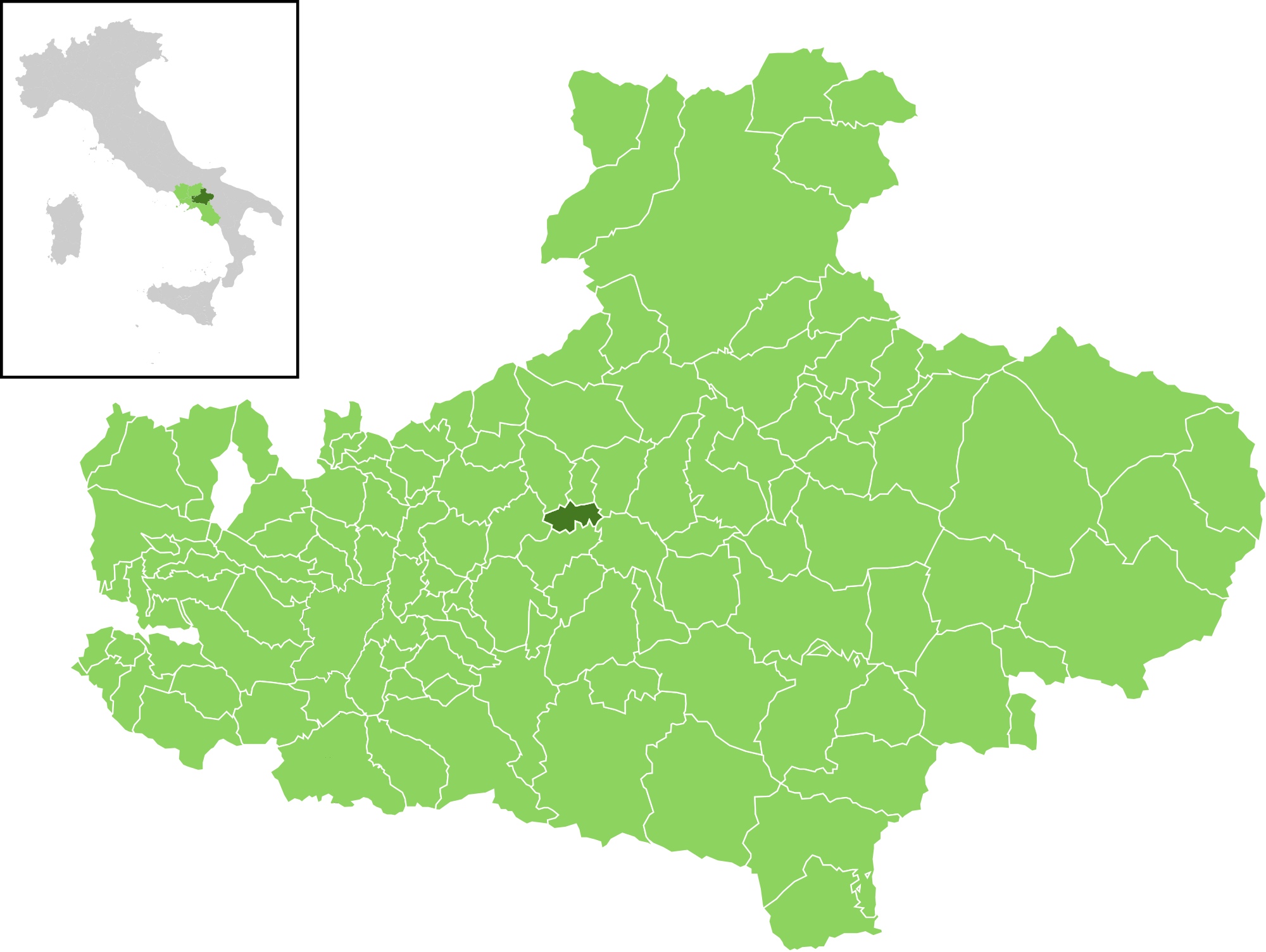 Il comune all'interno della provincia di Avellino